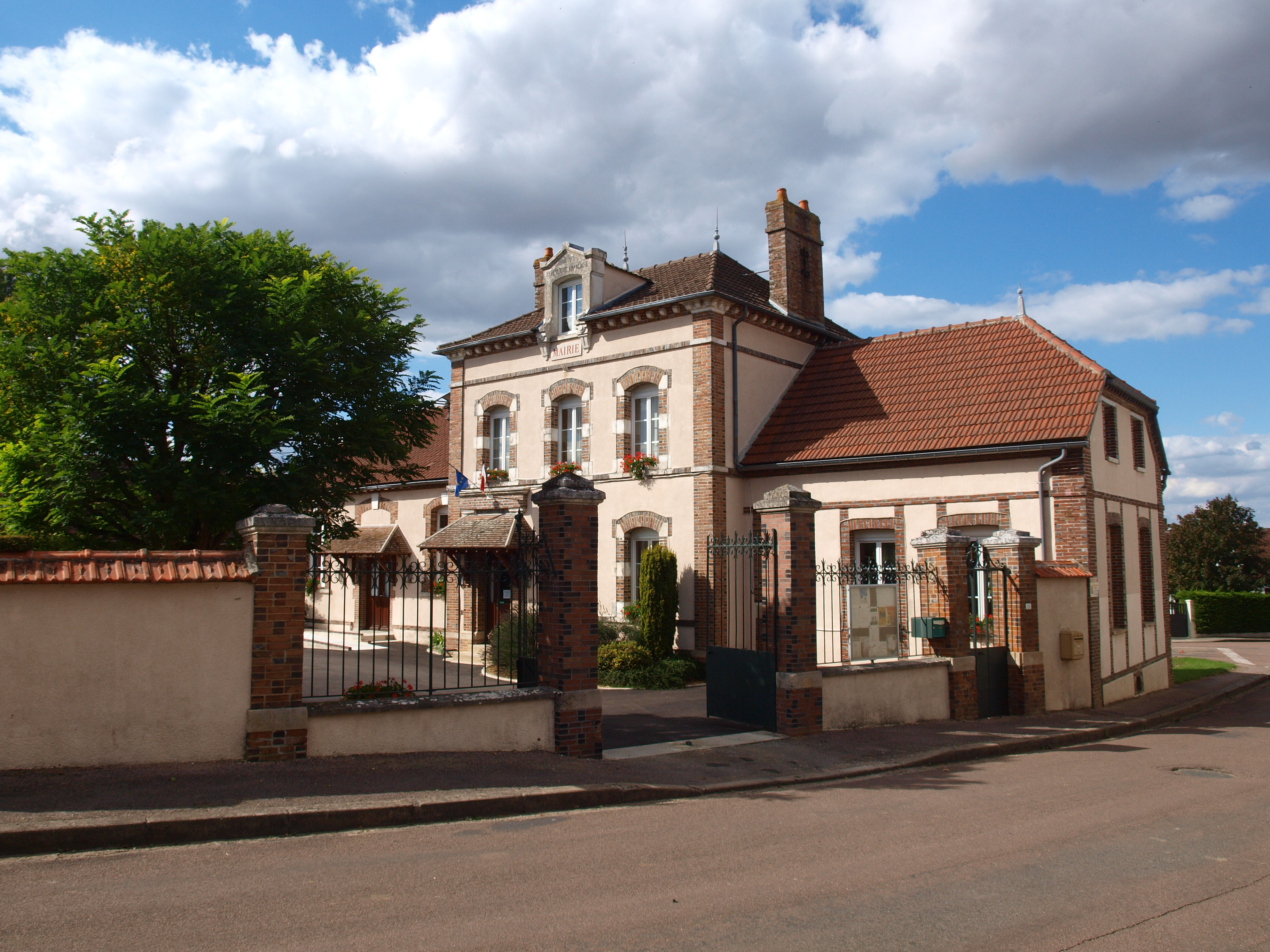 Perceneige (Yonne, France) ; village de Villiers-Bonneux : mairie